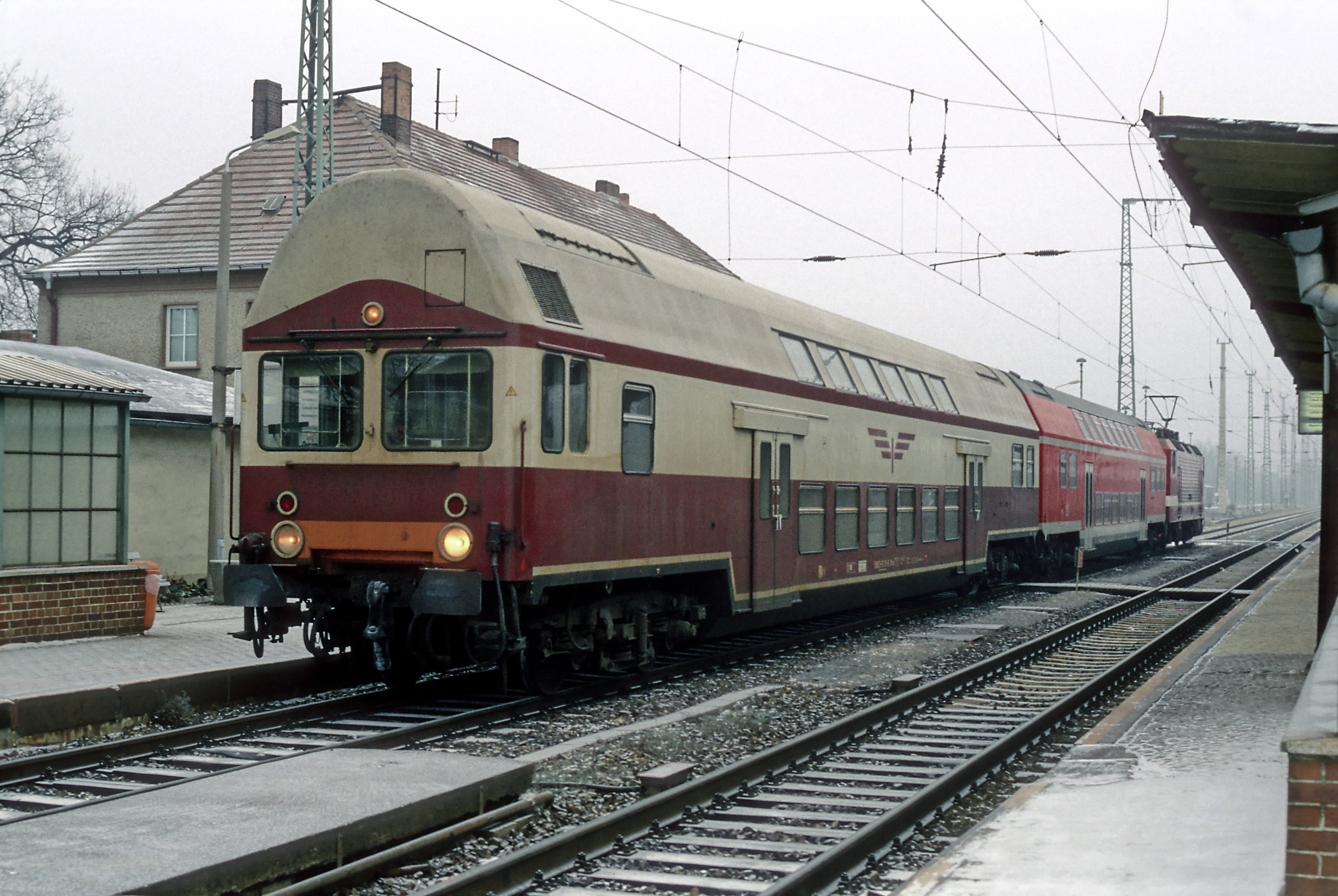 Steuerwagen im Lieferzustand, Sonderlackierung für Berlin, eingeführt beim Stadtjubiläum 1987. Dieser Anstrich wurde auch für die Gleichstromtriebwagen der S-Bahn verwendet.